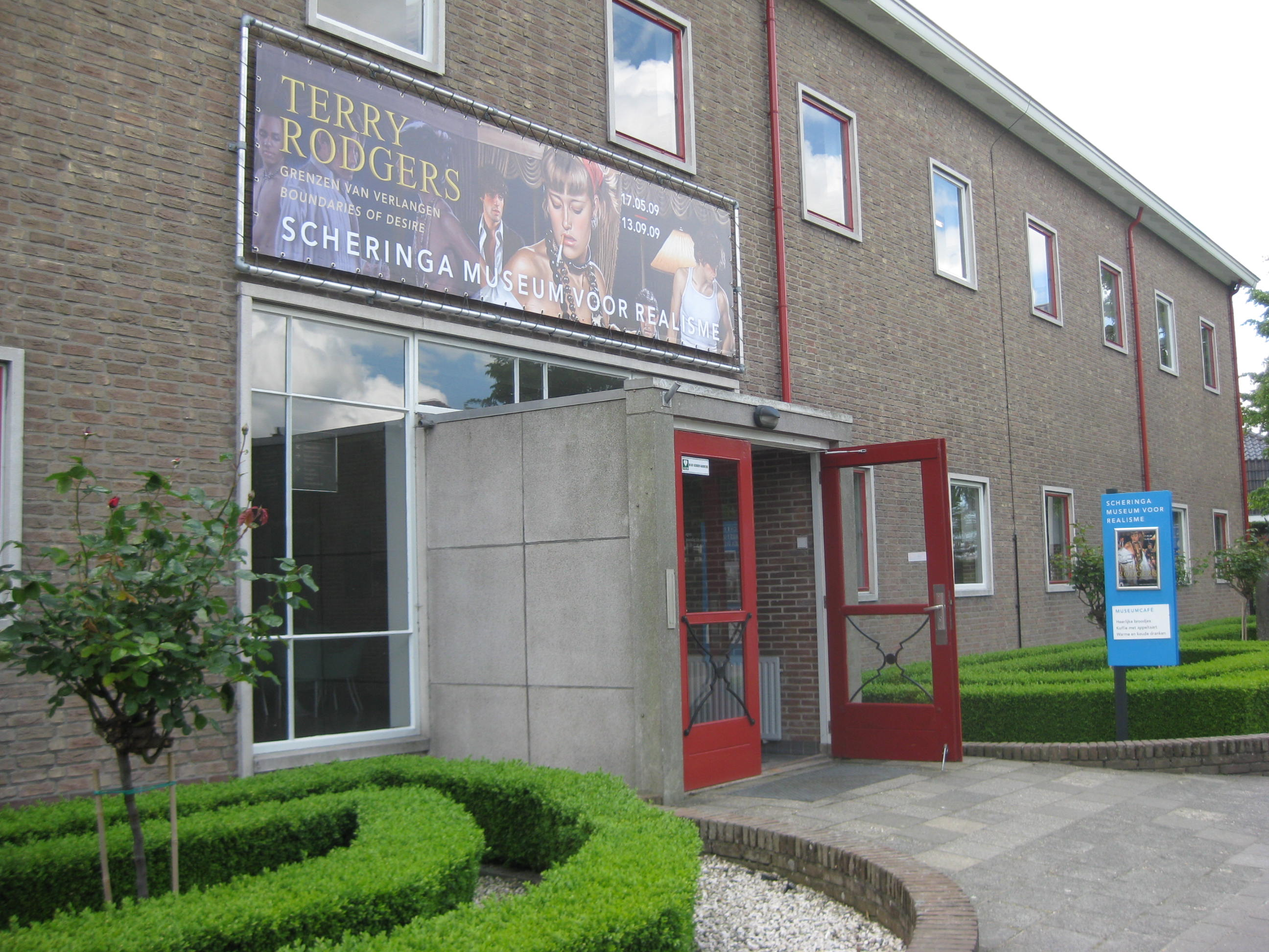 Scheringa Museum voor Realisme in Spanbroek, Nederland